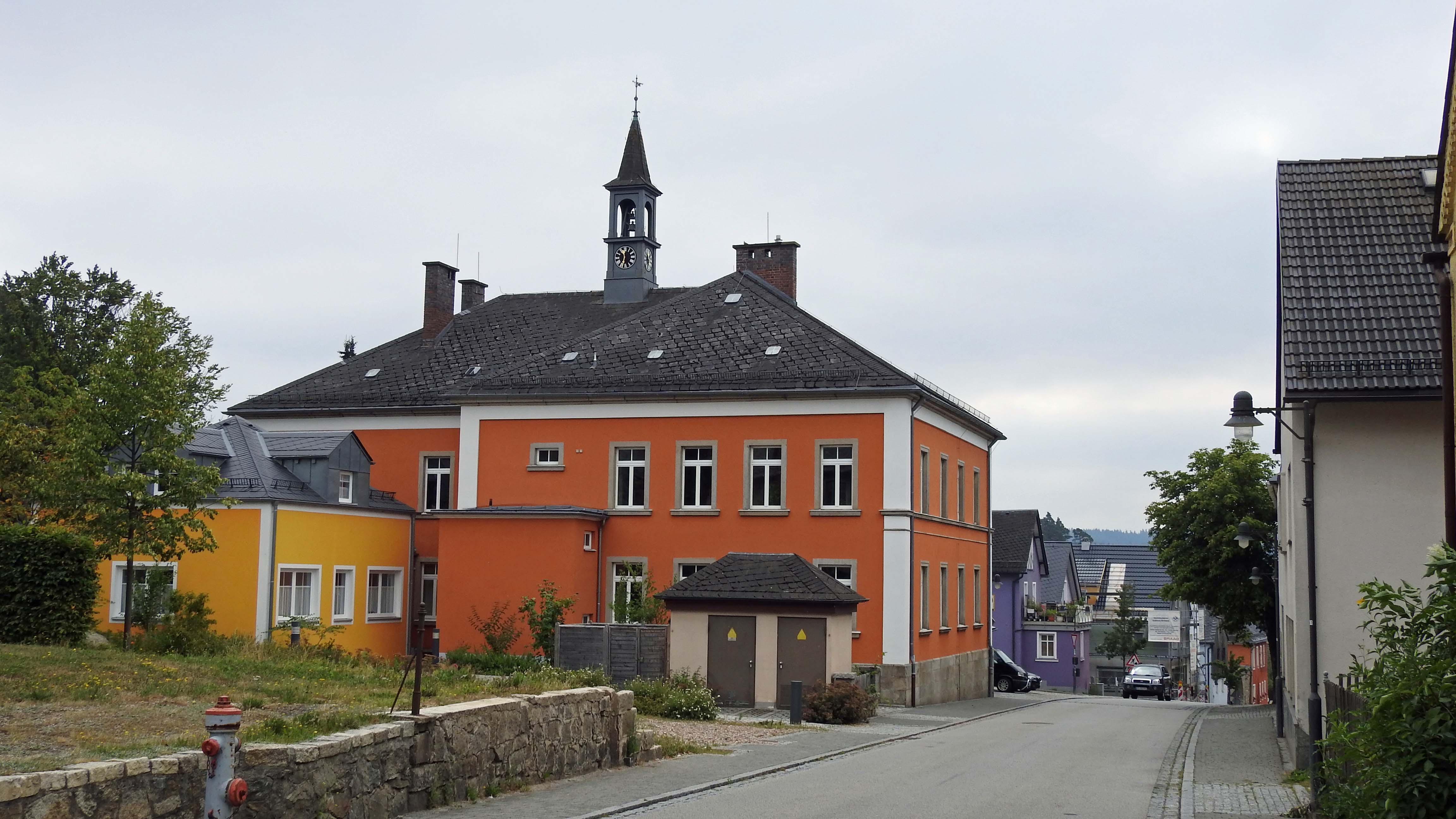 Rathaus in Röslau